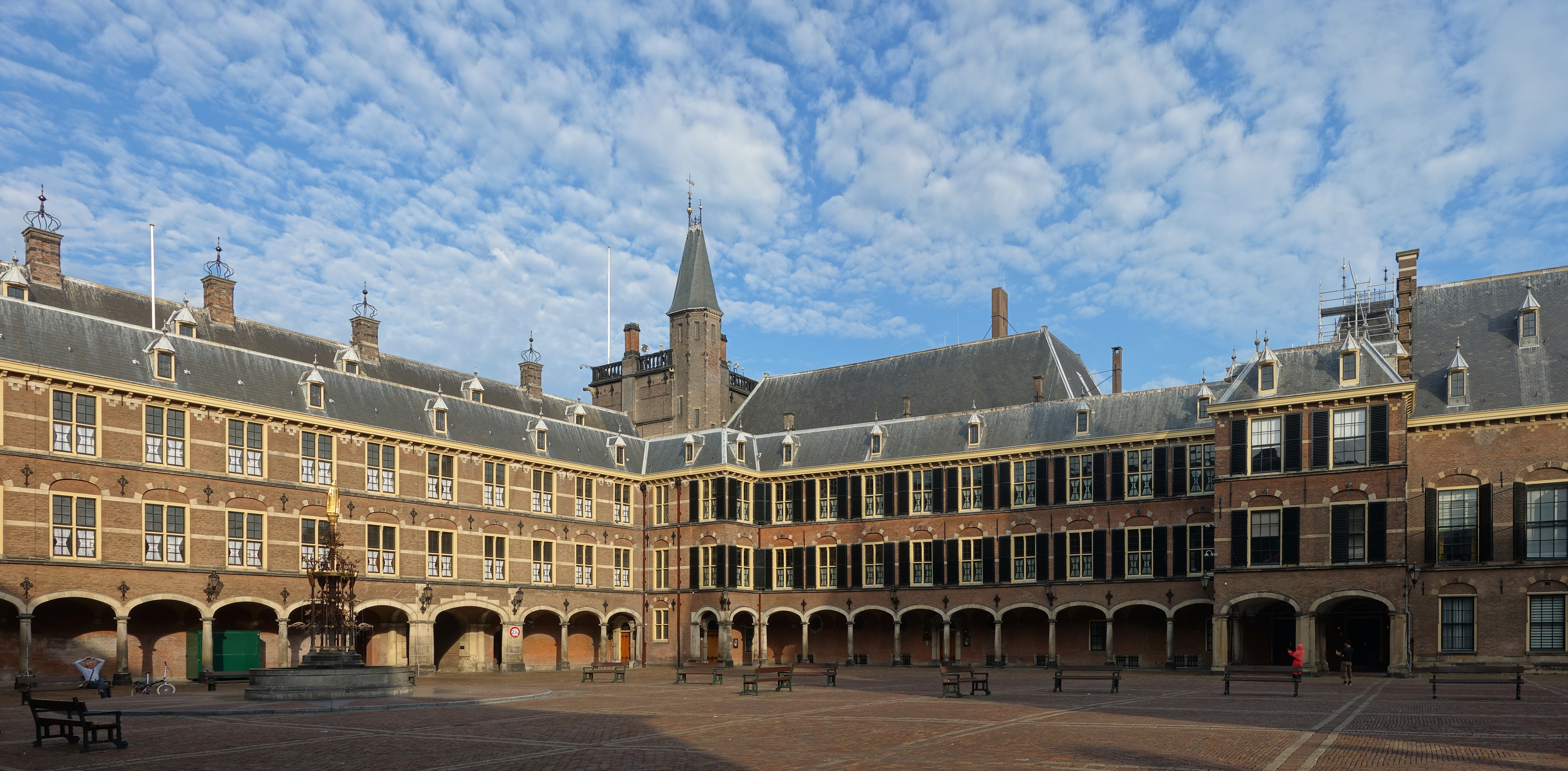 Vue intérieure du Binnenhof à La Haye.